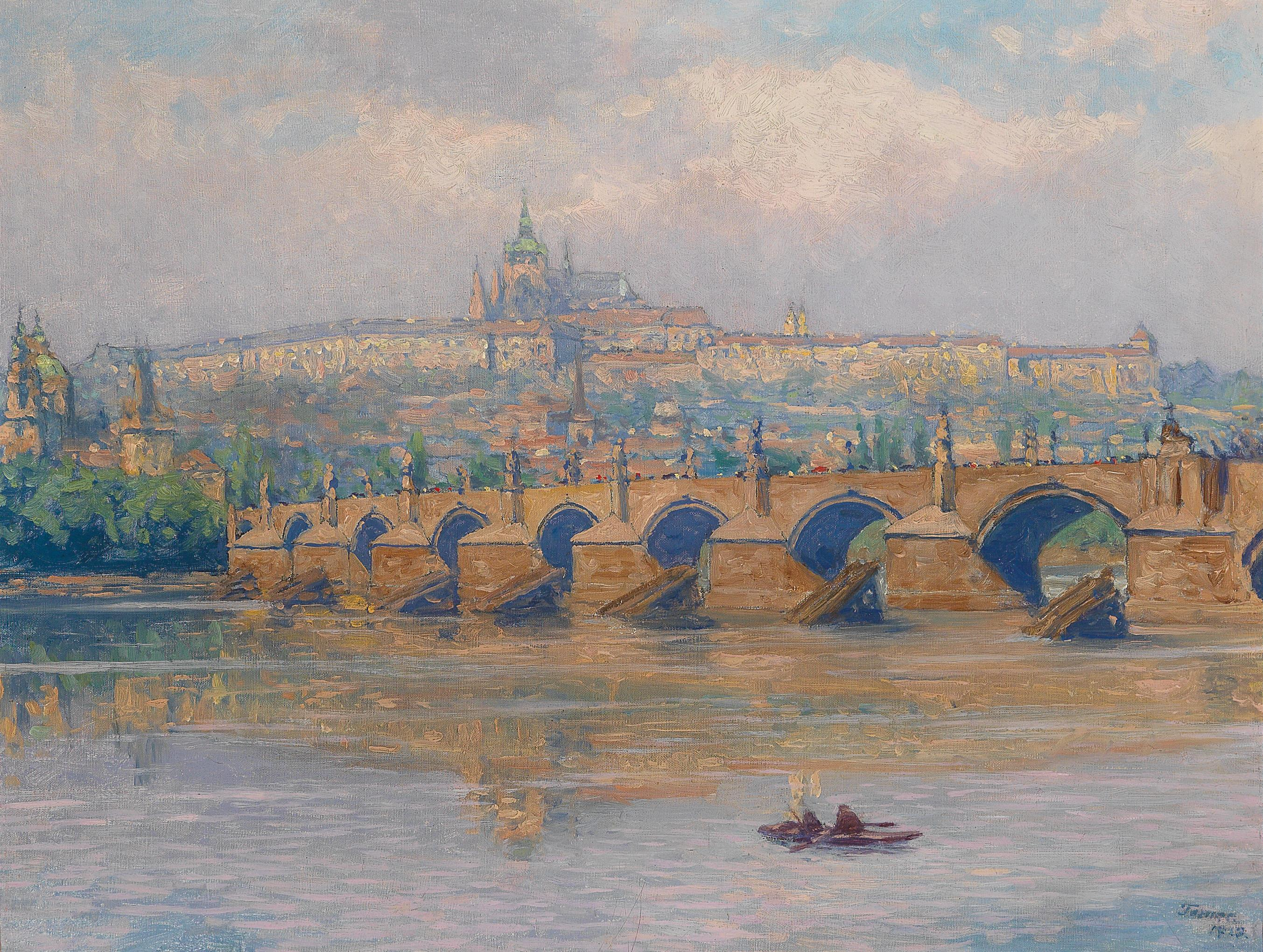 Prag, signiert und datiert Tomec 1913, Öl auf Leinwand, 50,5 x 65 cm